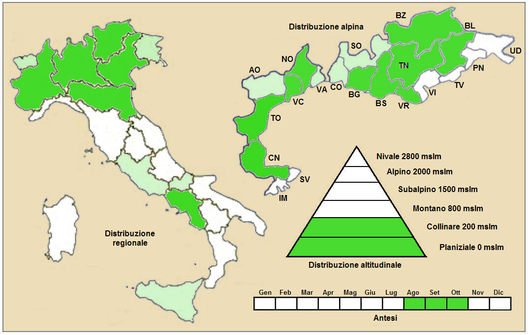 Artemisia annua - Distribuzione